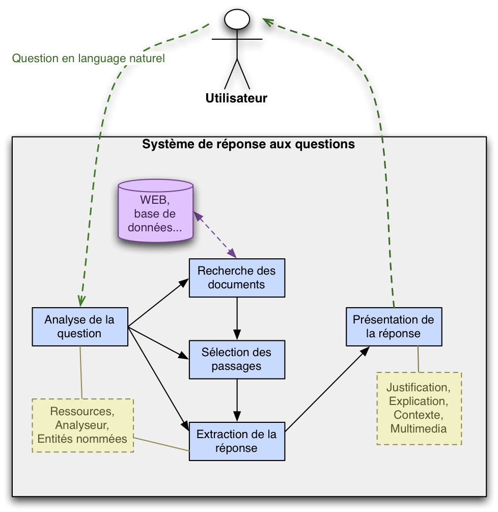 Schéma de l'architecture d'un système de question réponse